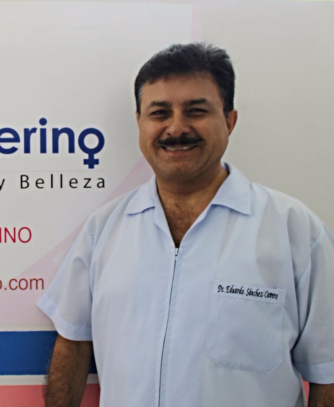 Médico Ginecólogo Dr. Eduardo Alfredo Sánchez Cavero en el Centro del Mioma.